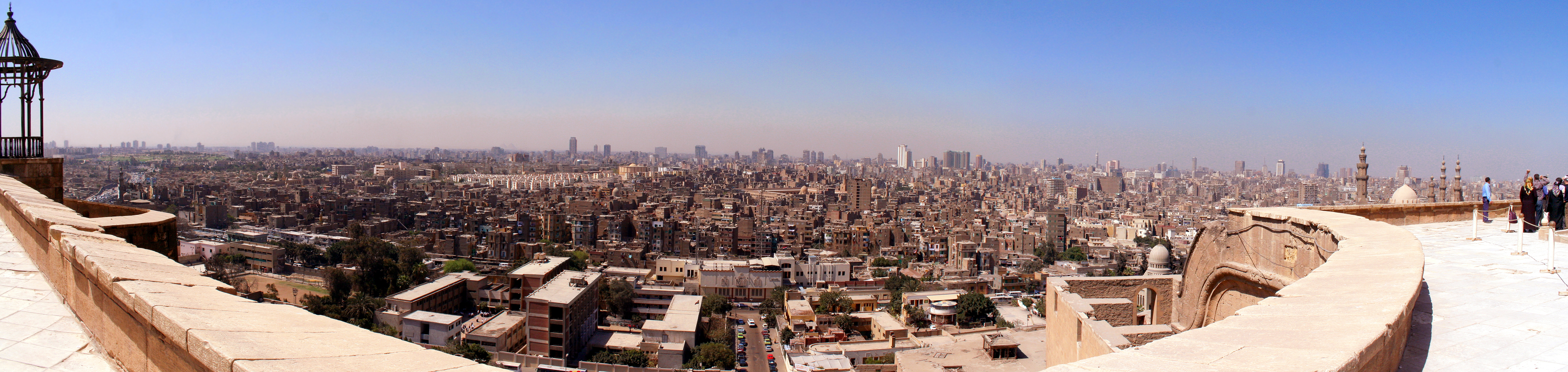 Panorámica de El Cairo (Egipto)